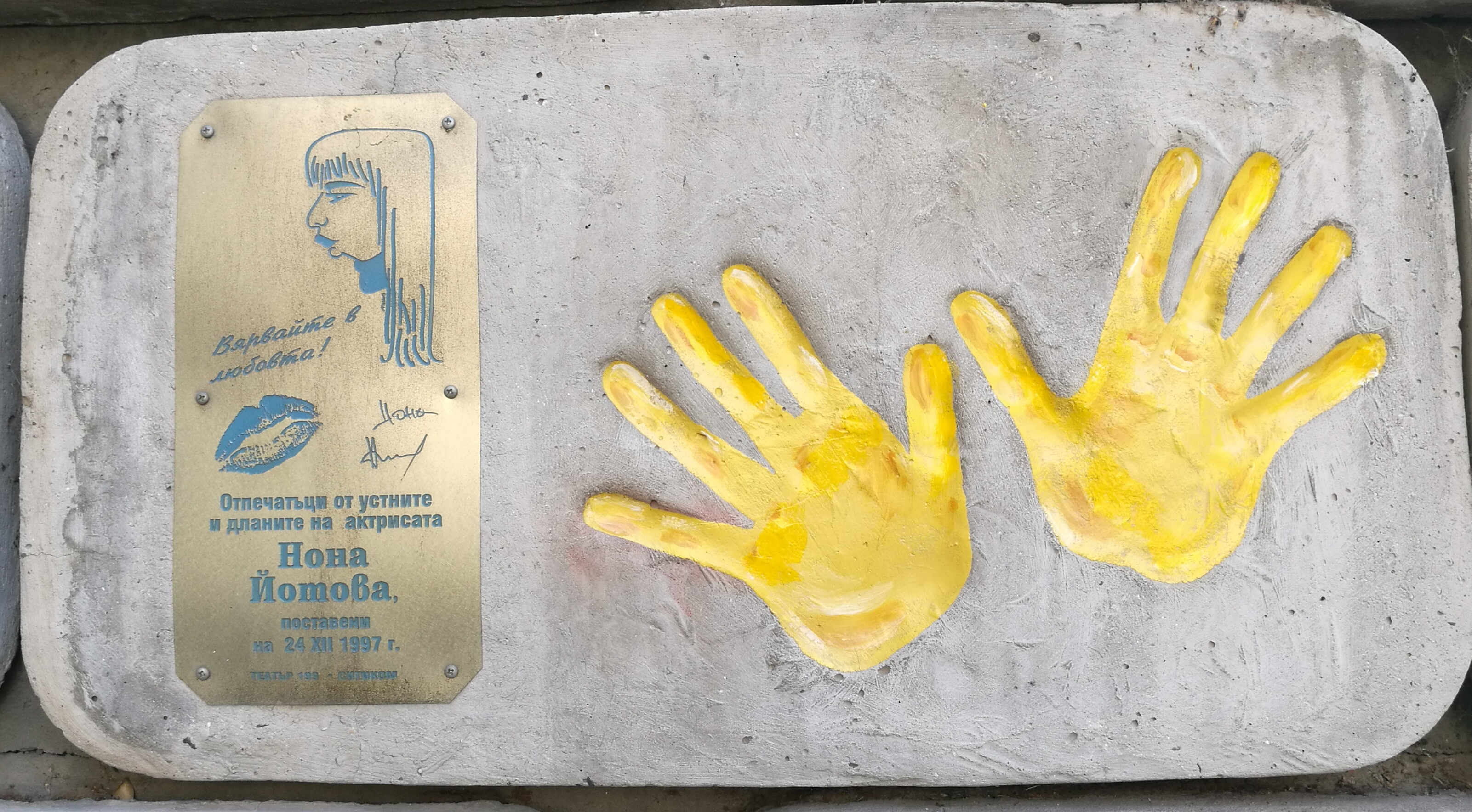 Стената на славата пред Театър 199 - пано с отпечатъци, послание и шарж на Нона Йотова.